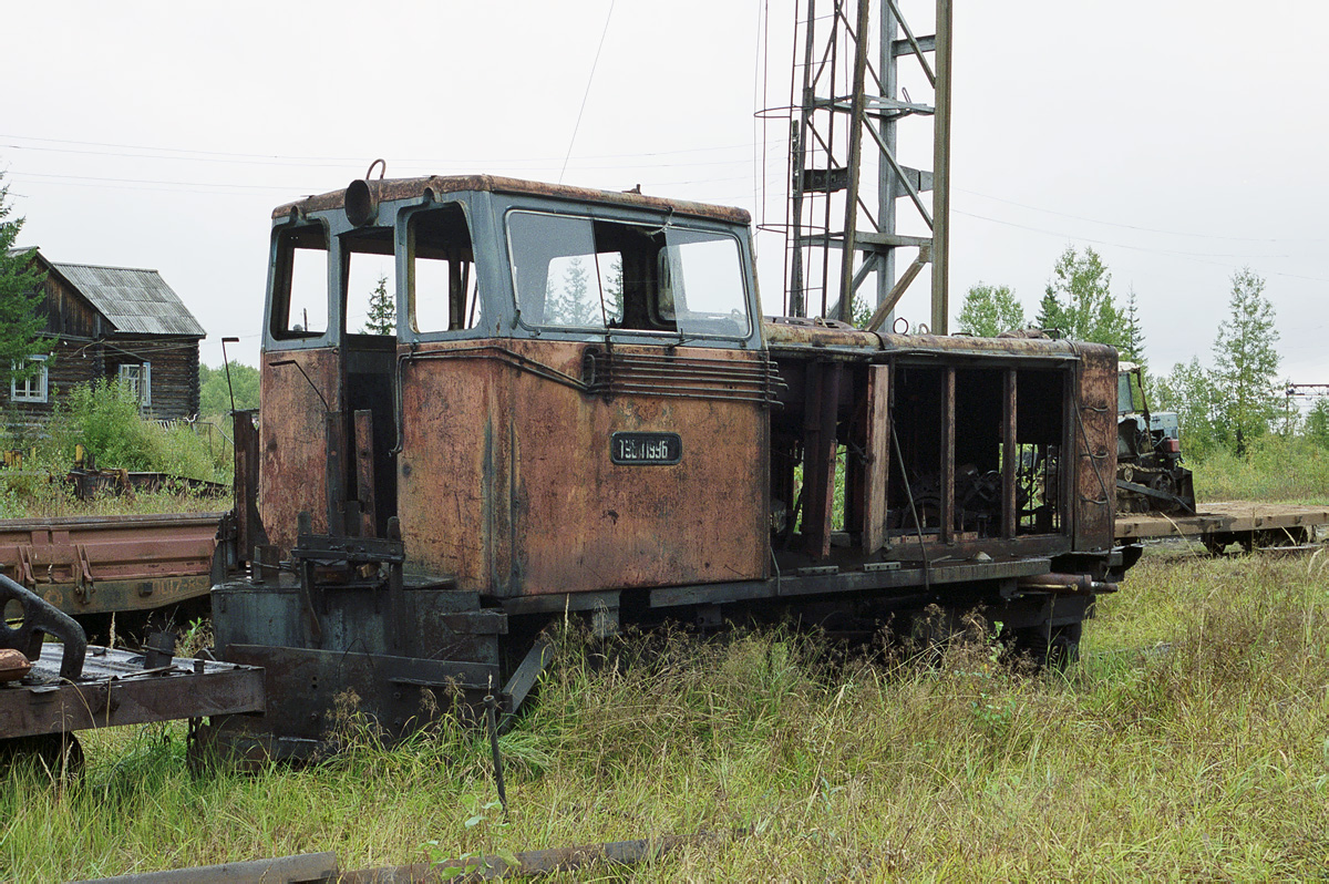 Переоборудован в снегоочиститель